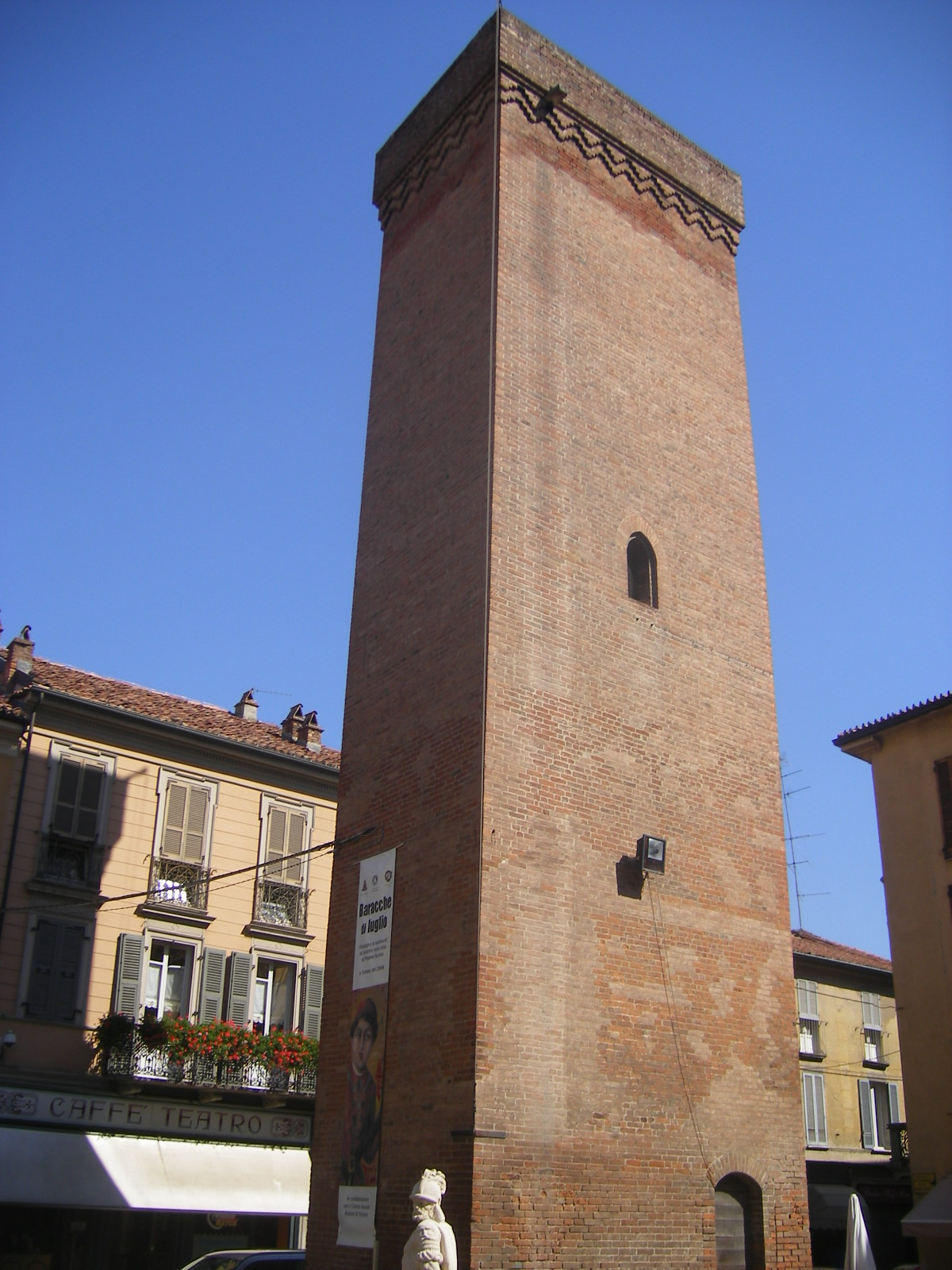 Tortona